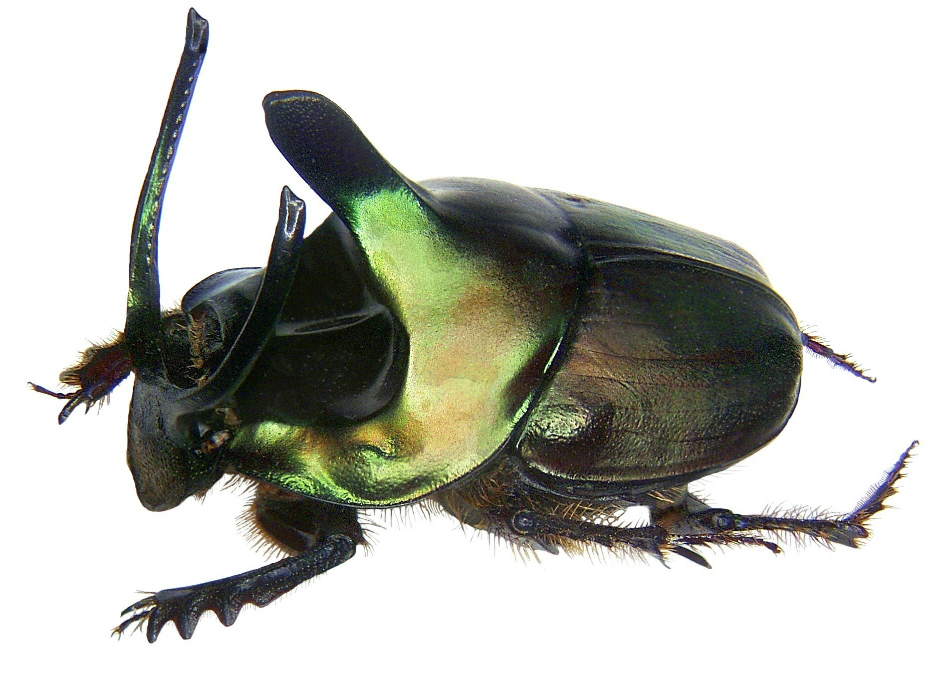 Familie: Scarabaeidae Grösse: 16 mm Fundort: Thailand, Khon Khaen leg. H.Wilberg, 1984; det. U.Schmidt Foto: U.Schmidt, 2007